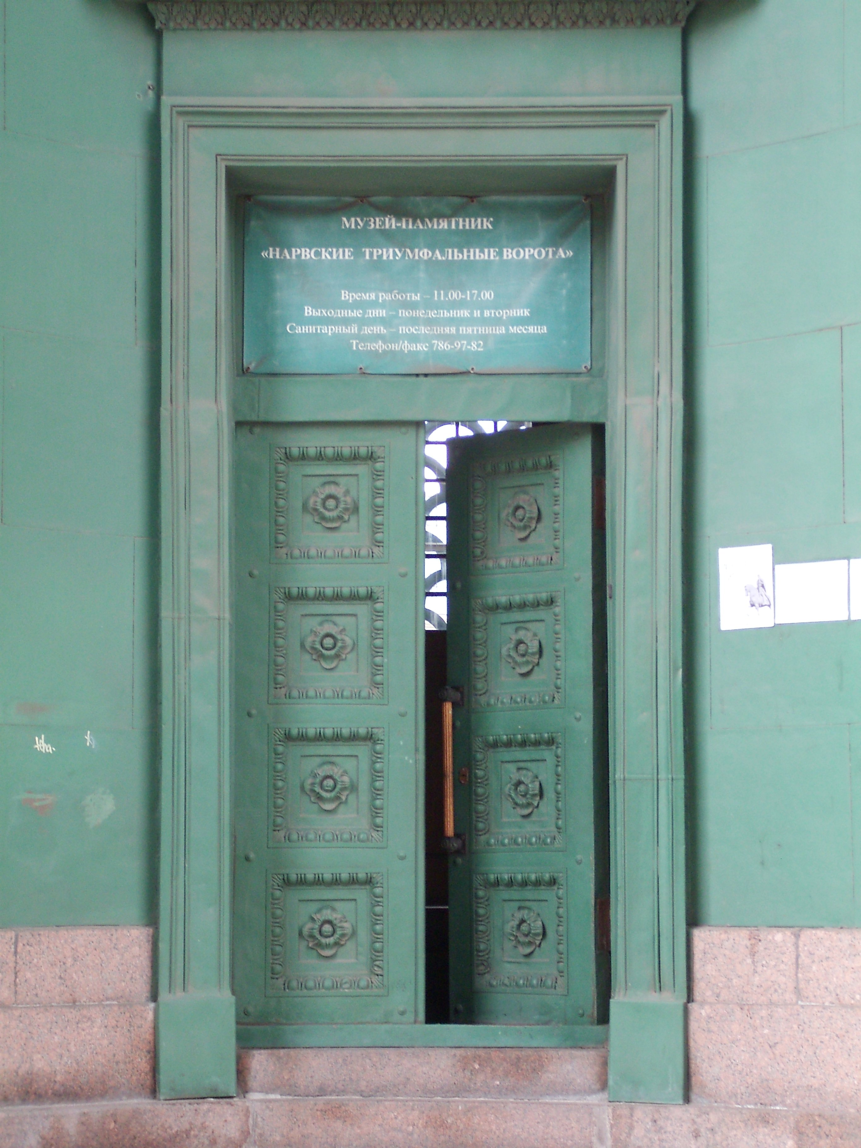 Музей-памятник «Нарвские триумфальные ворота»